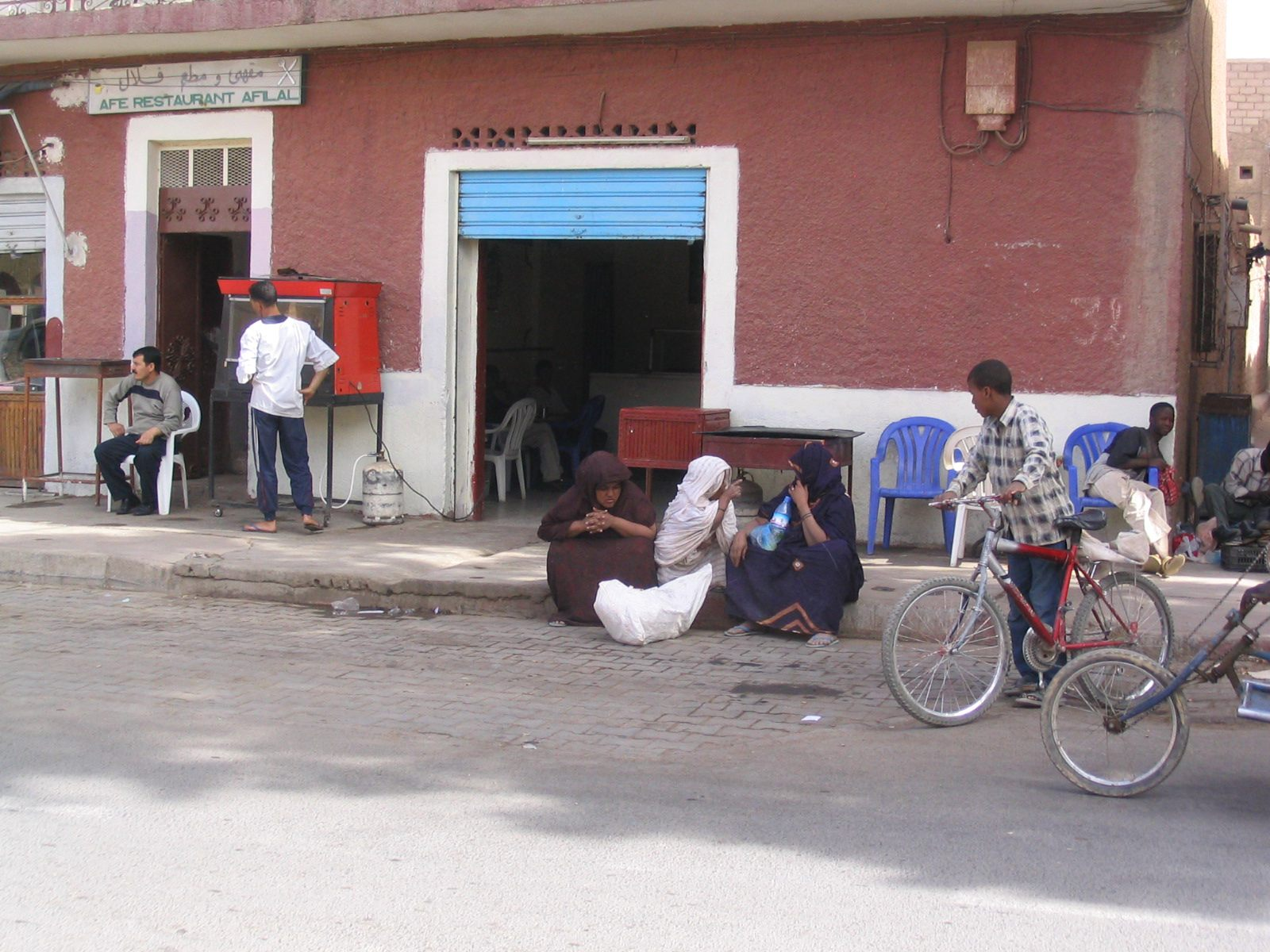 Scène de rue de Tamanrasset